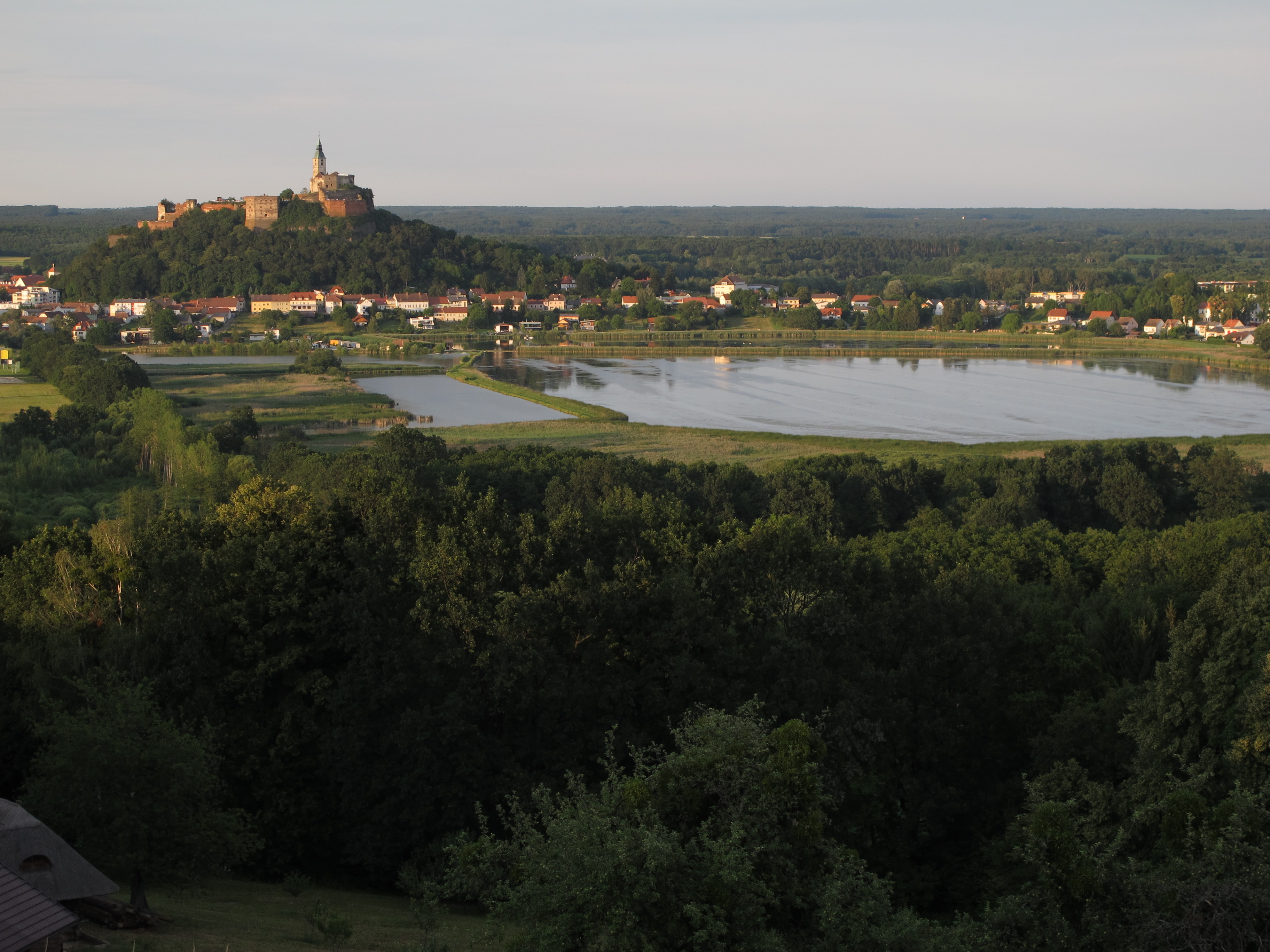 Güssing im Burgenland